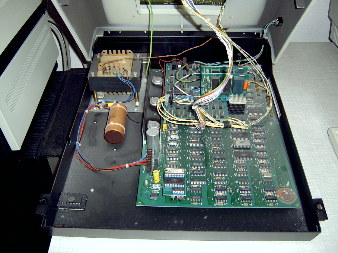 CBM-8000-Platine mit diversen Erweiterungen